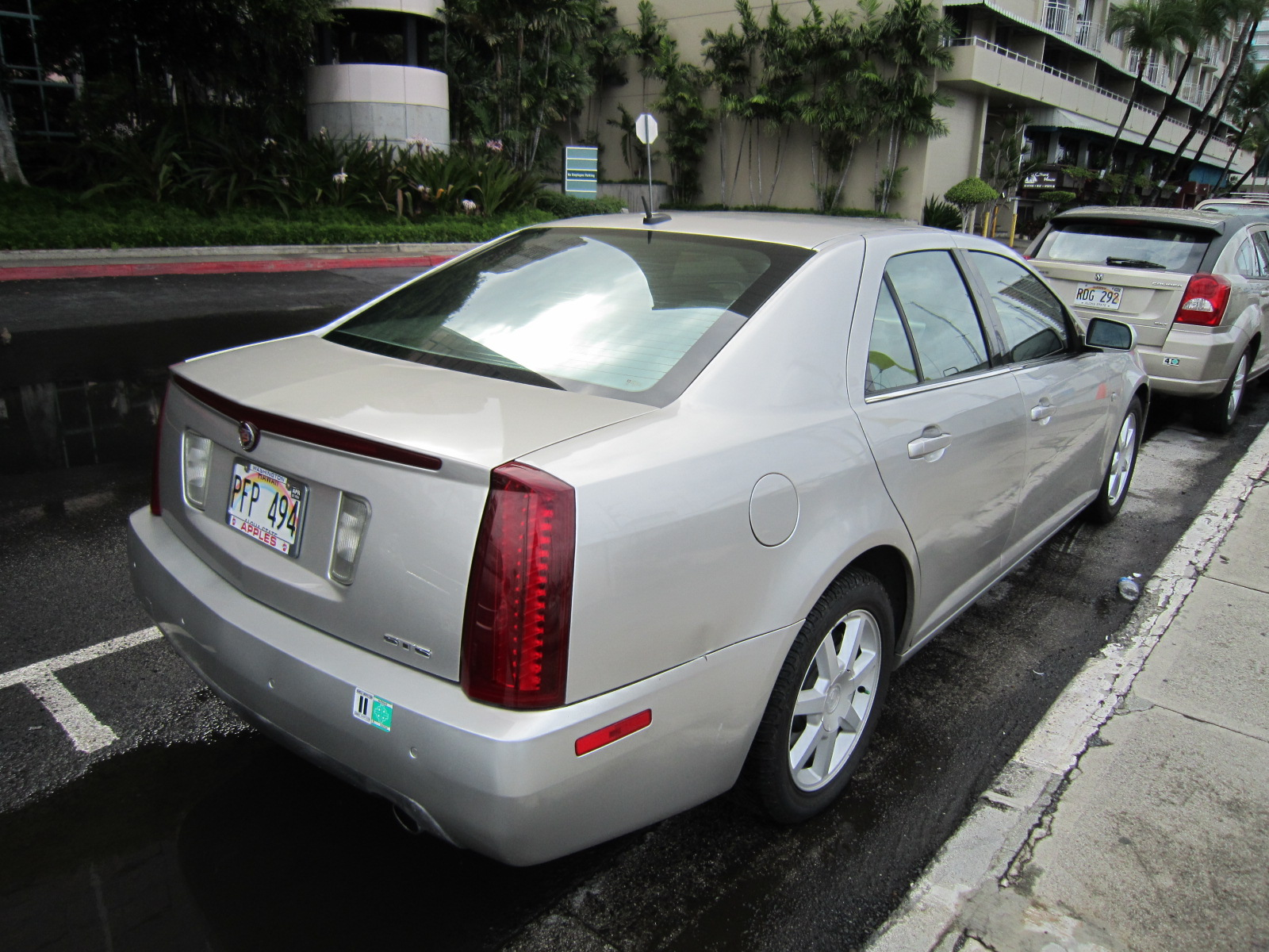 Cadillac STS